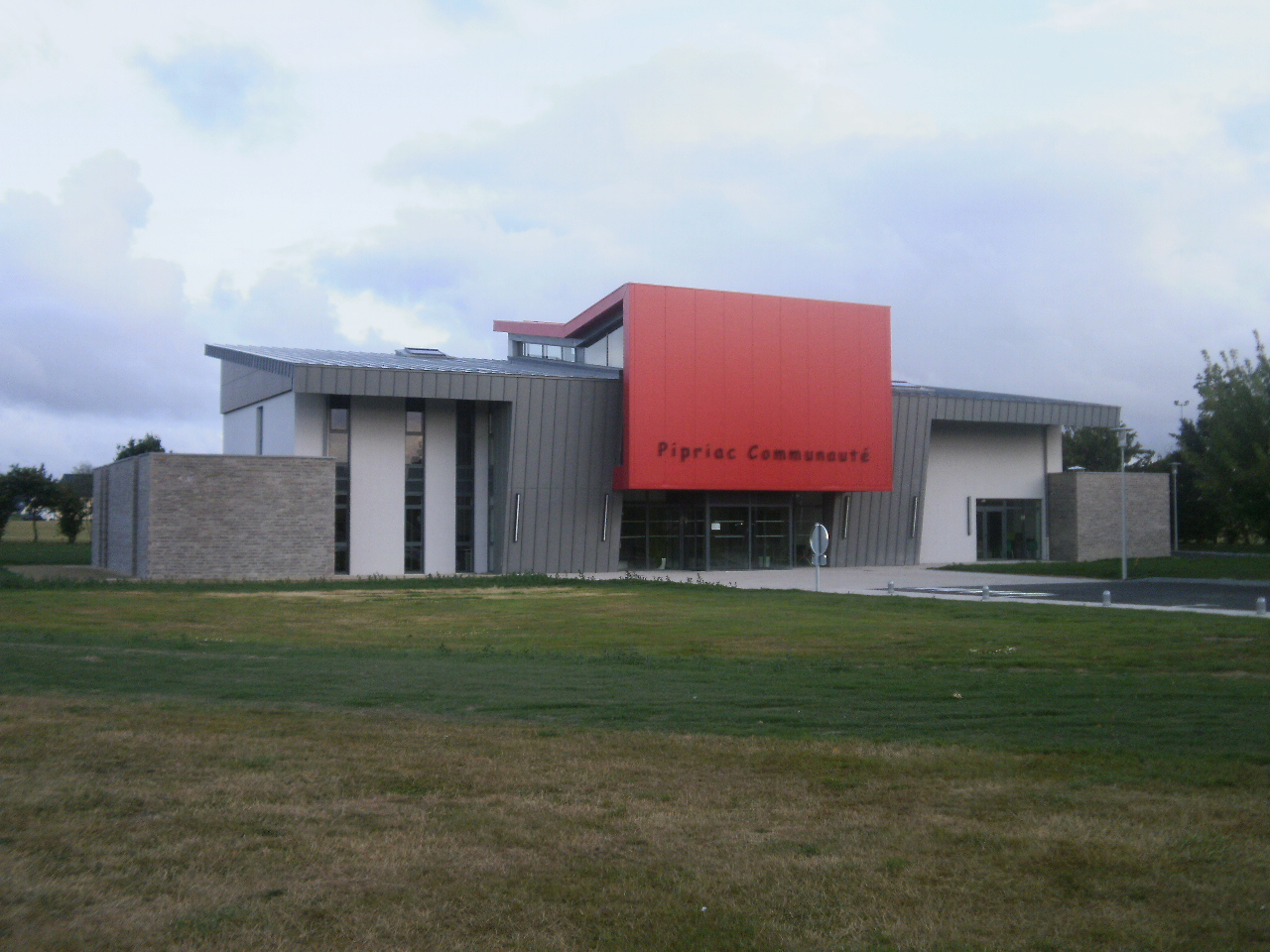 Maison communautaire de Pipriac Communauté